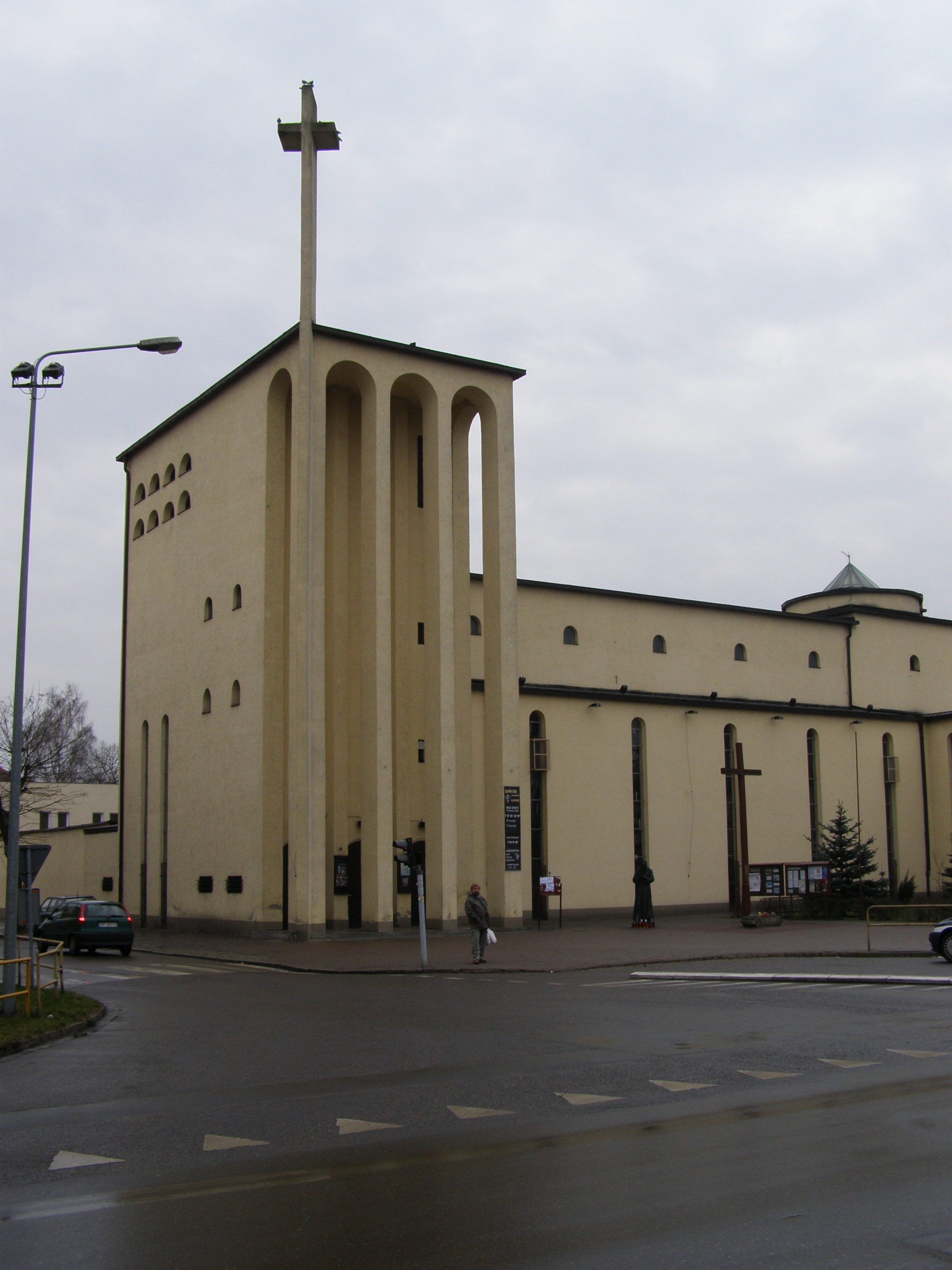 Fasada kścioła p.w. św. Antoniego w Pile